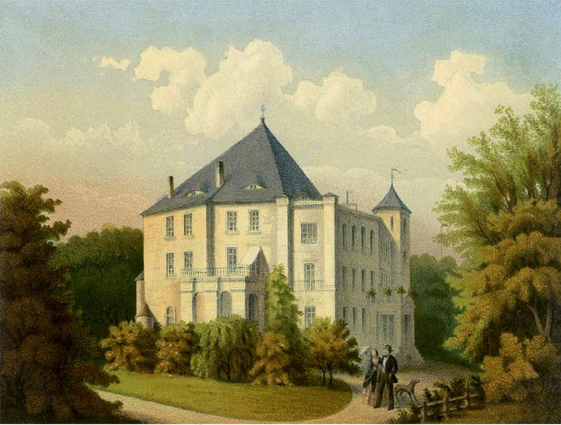 Schloss Auras, Kreis Wohlau, Provinz Schlesien, Lithografie aus dem 19. Jahrhundert